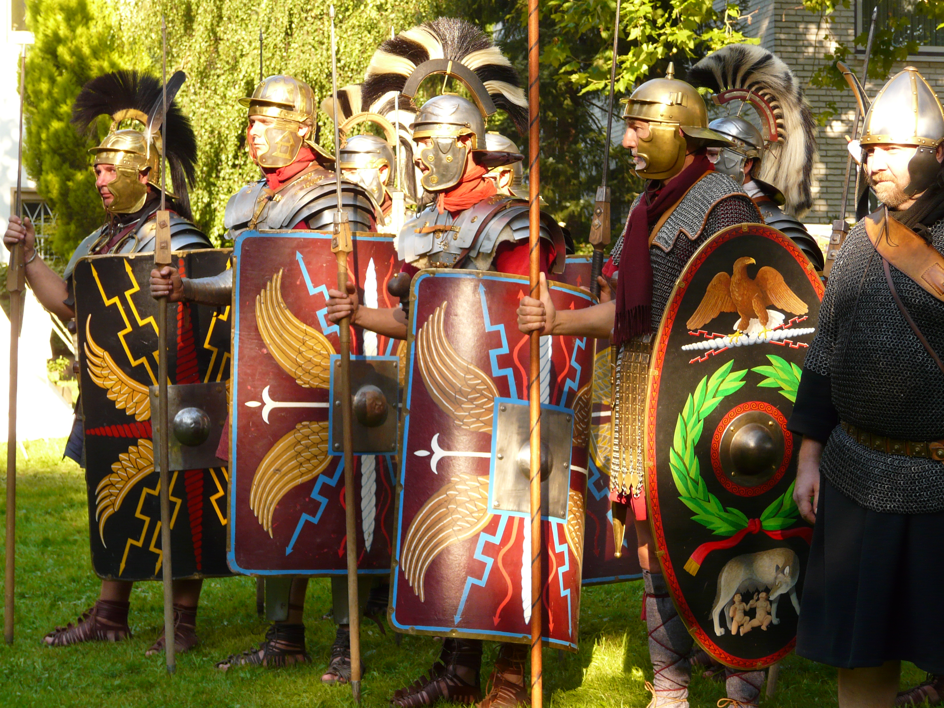 Römergruppe Milites Bedenses beim NRW-Tag in Wuppertal